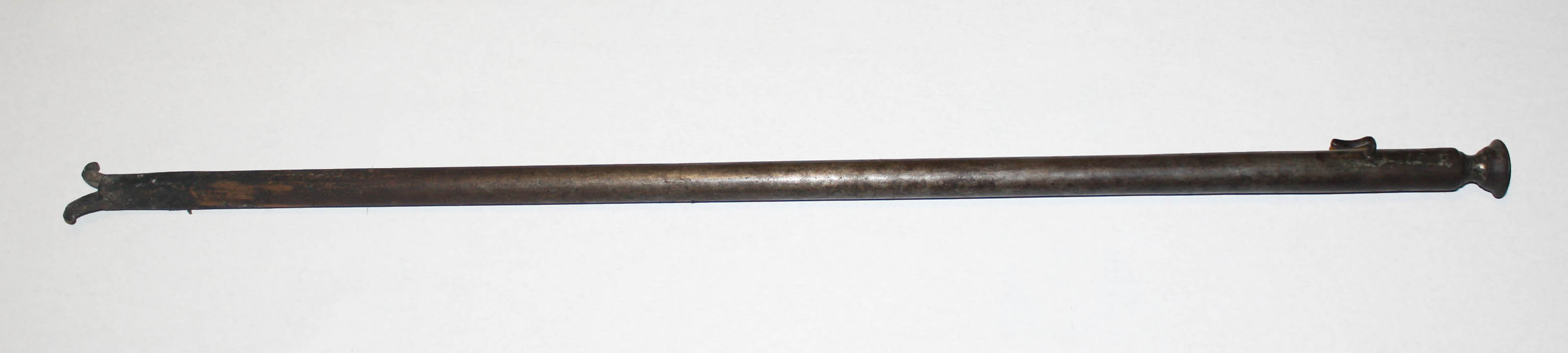 soufflet à bouche ou soufflette ou sarbacane, qu'on employait pour attiser le feu.